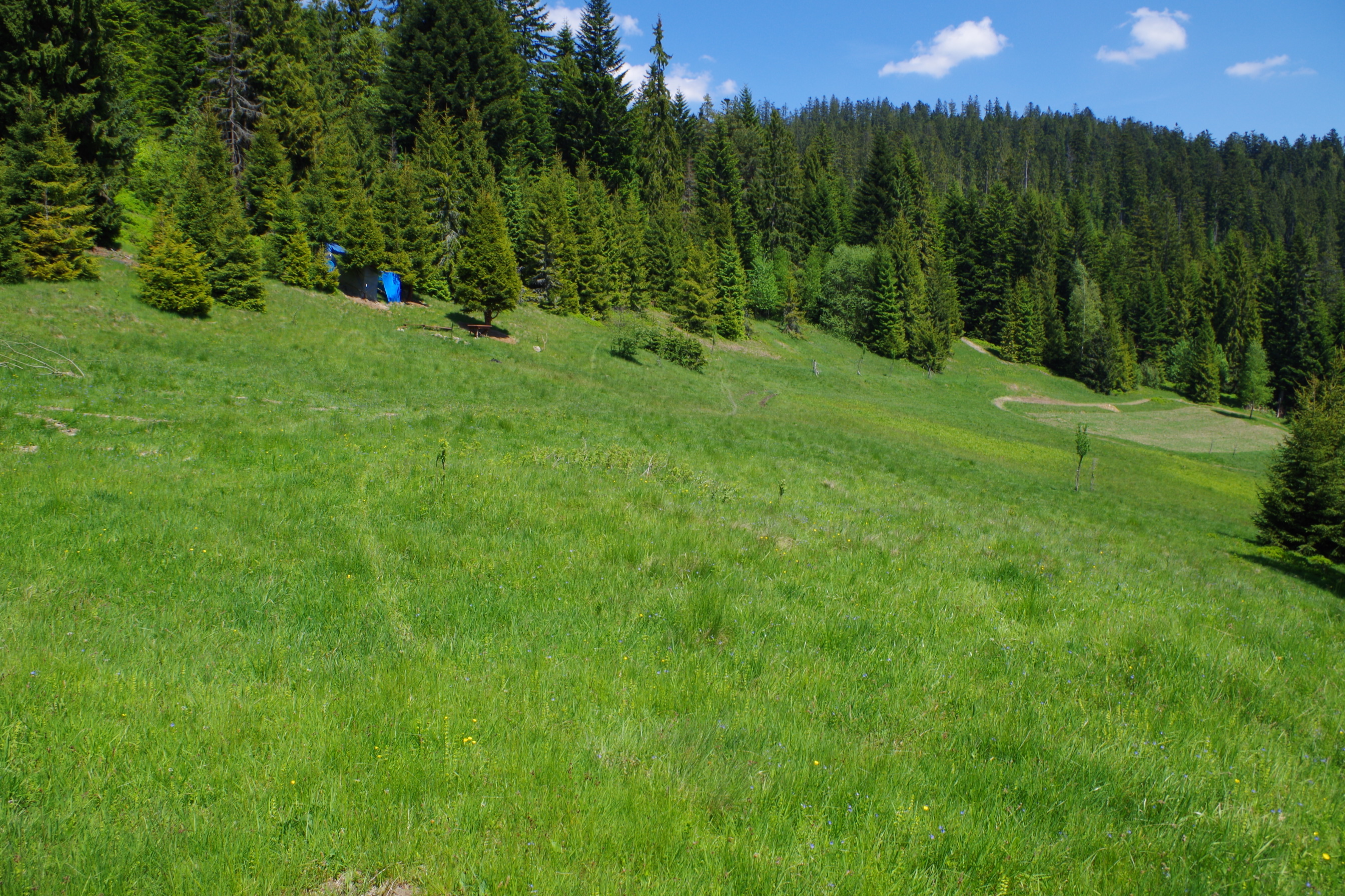 Polana Bernadowa